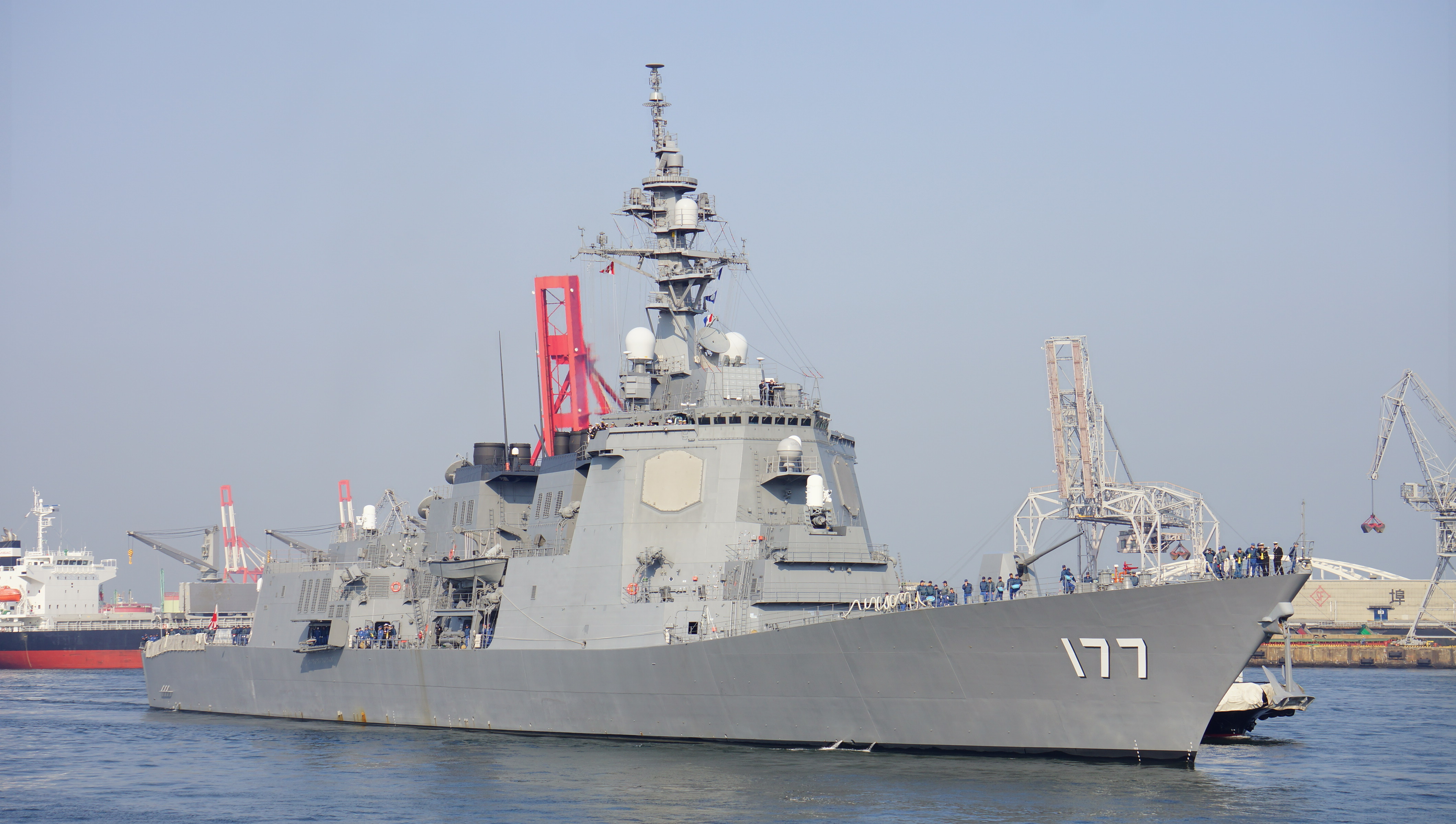 海上自衛隊 護衛艦あたご（DDG-177） 入港時。 14年4月26日 天保山埠頭にて。